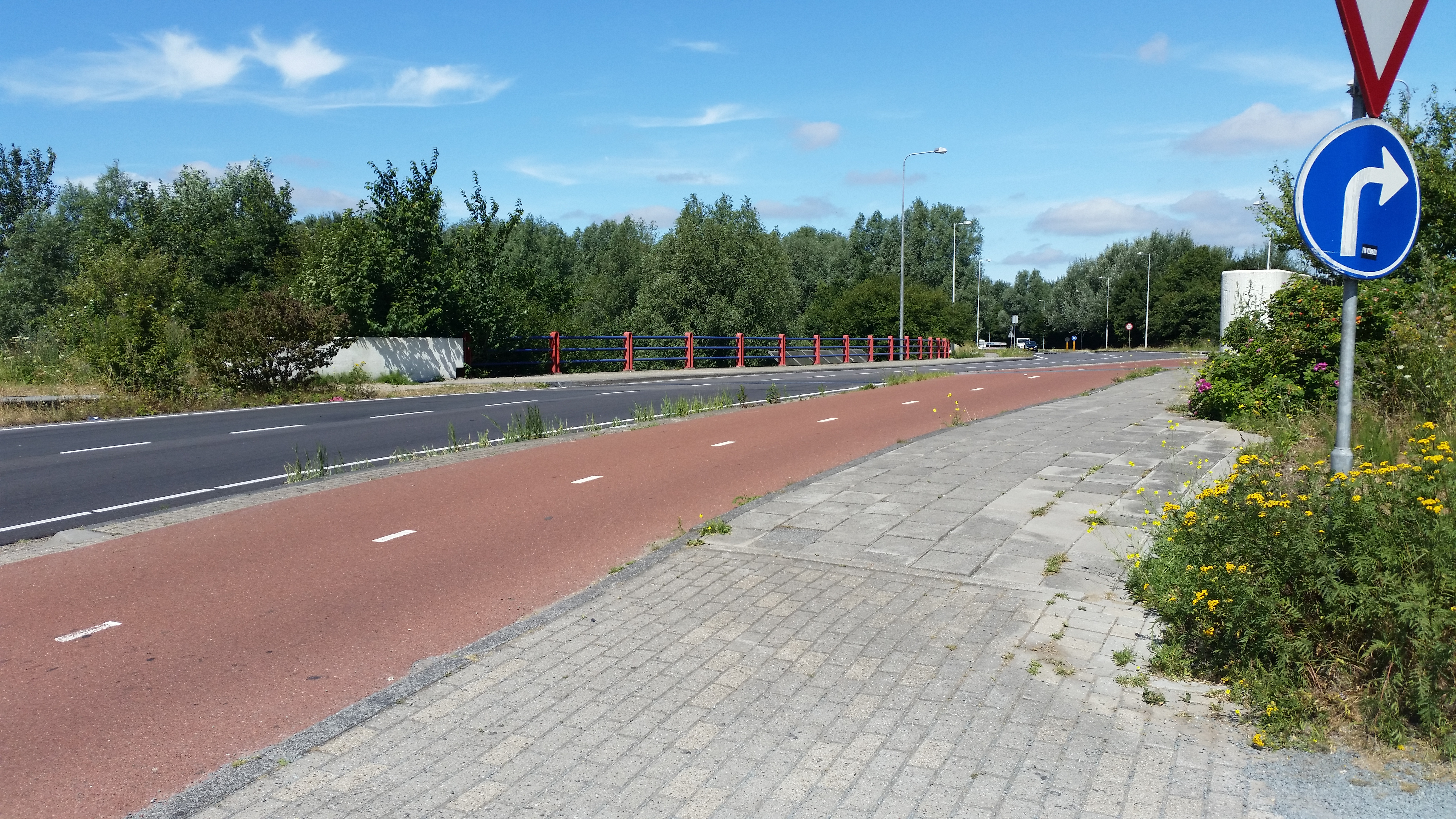 Brug 1950 (in Amsterdam), wegdek